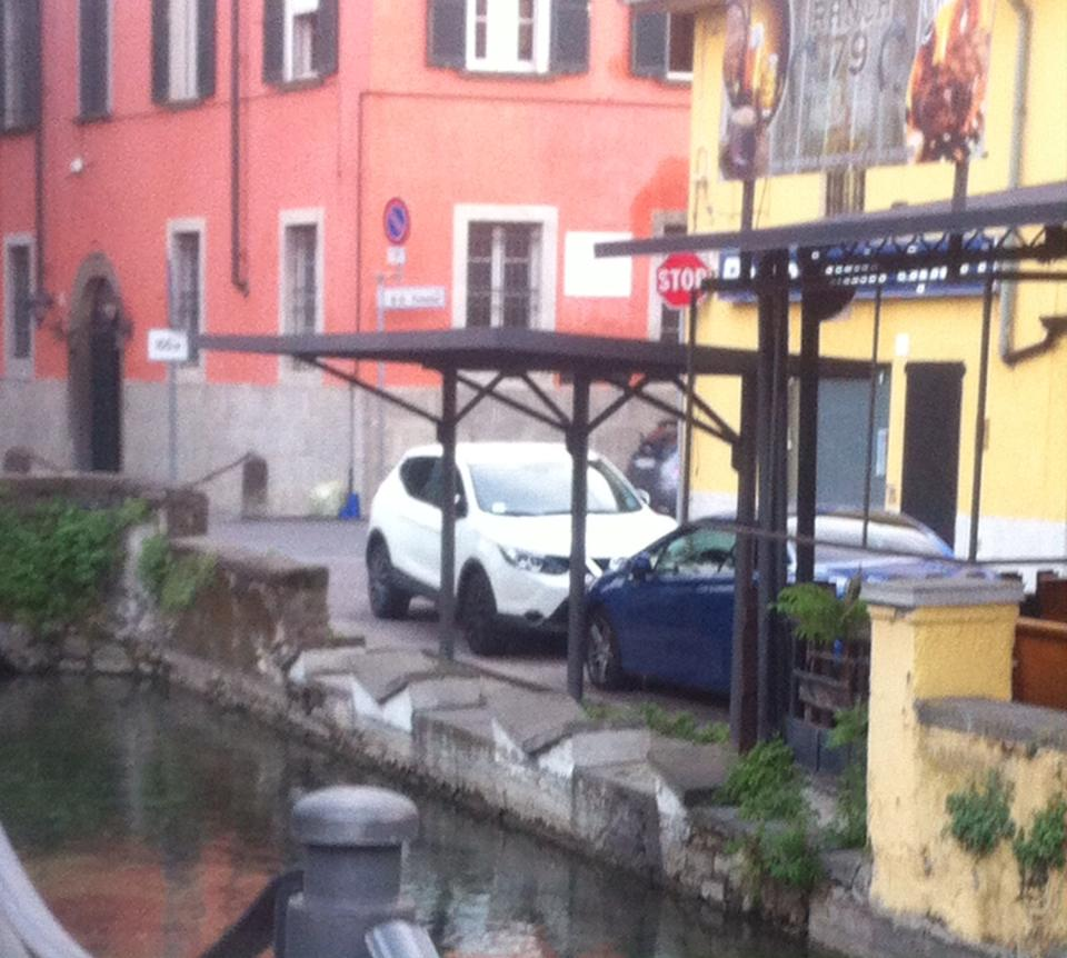 Storici lavatoi in Chiari